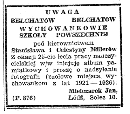 Ogłoszenie prasowe Jana Mielczarka, opublikowane w Dzienniku Łódzkim (wydanie z 15 czerwca 1947 r., rok III, nr 161 (711)) z prośbą o nadsyłanie zdjęć do albumu pamiątkowego z okazji 25. lecia pracy nauczycielskiej Stanisława i Celestyny Millerów. Stanisław Miller - nauczyciel, pierwszy kierownik szkoły im. A. Mickiewicza w Bełchatowie, wiceburmistrz Bełchatowa. Celestyna Millerowa - nauczycielka, bełchatowska działaczka społeczno-kulturalna.